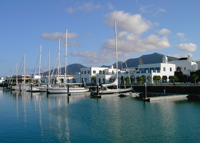 Kikötö Lanzarote szigetén (Kanári-szigetek, Spanyolország)